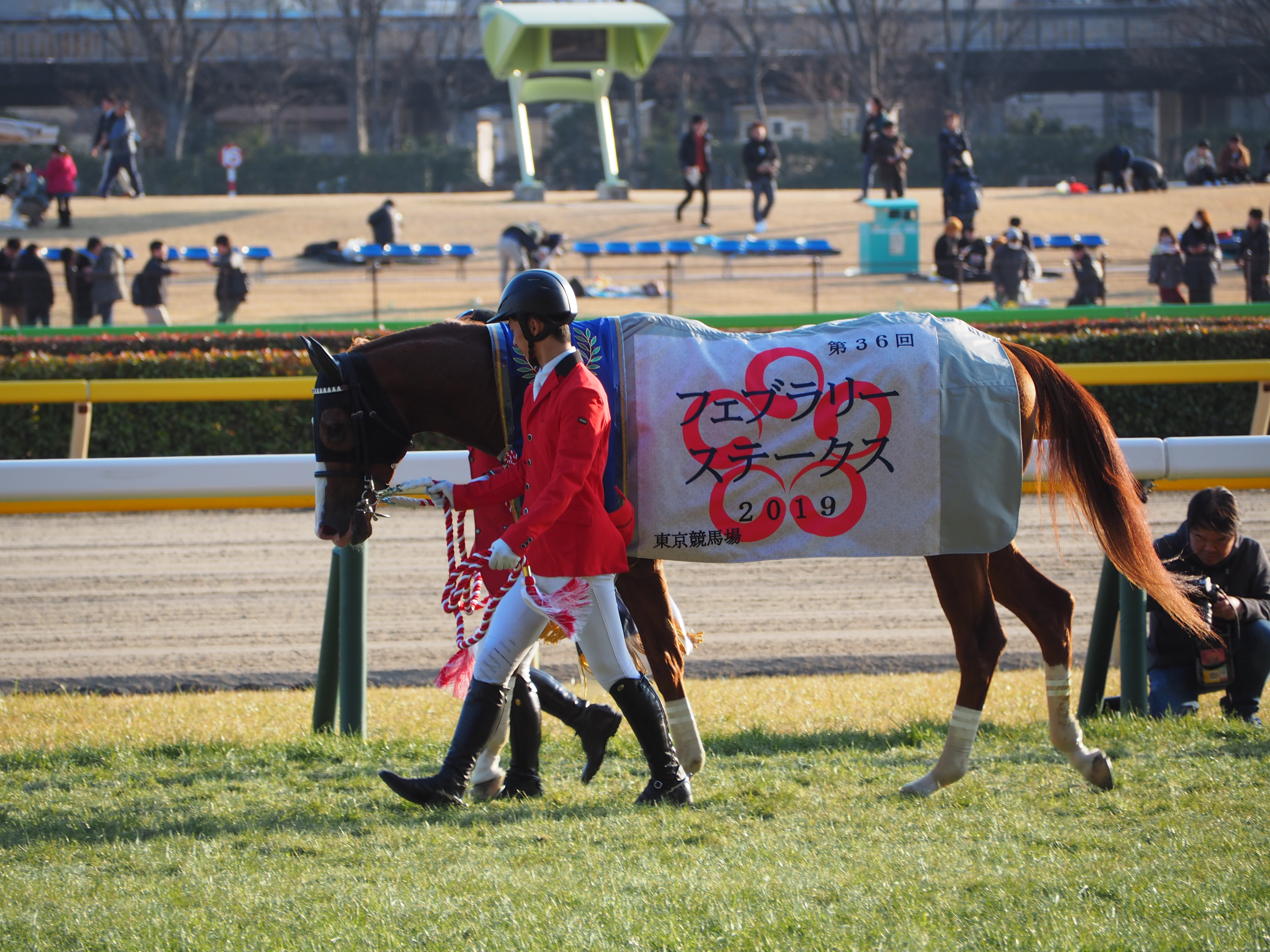 優勝レイをかけられ、曳かれ歩くインティ